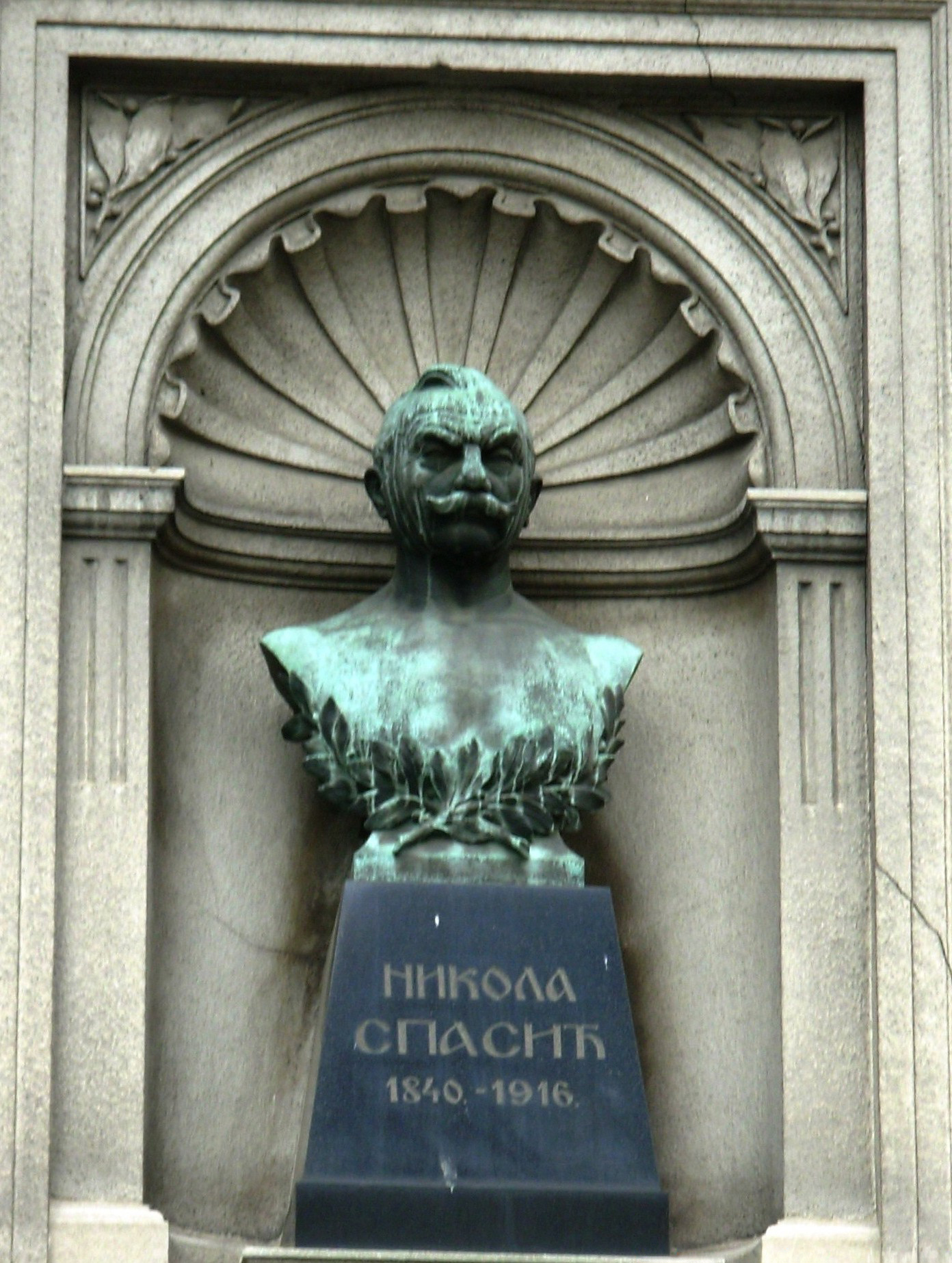 Биста Николе Спасића на згради-задужбини у кнез Михајловој улици, Београд. Сликао Голдфингер